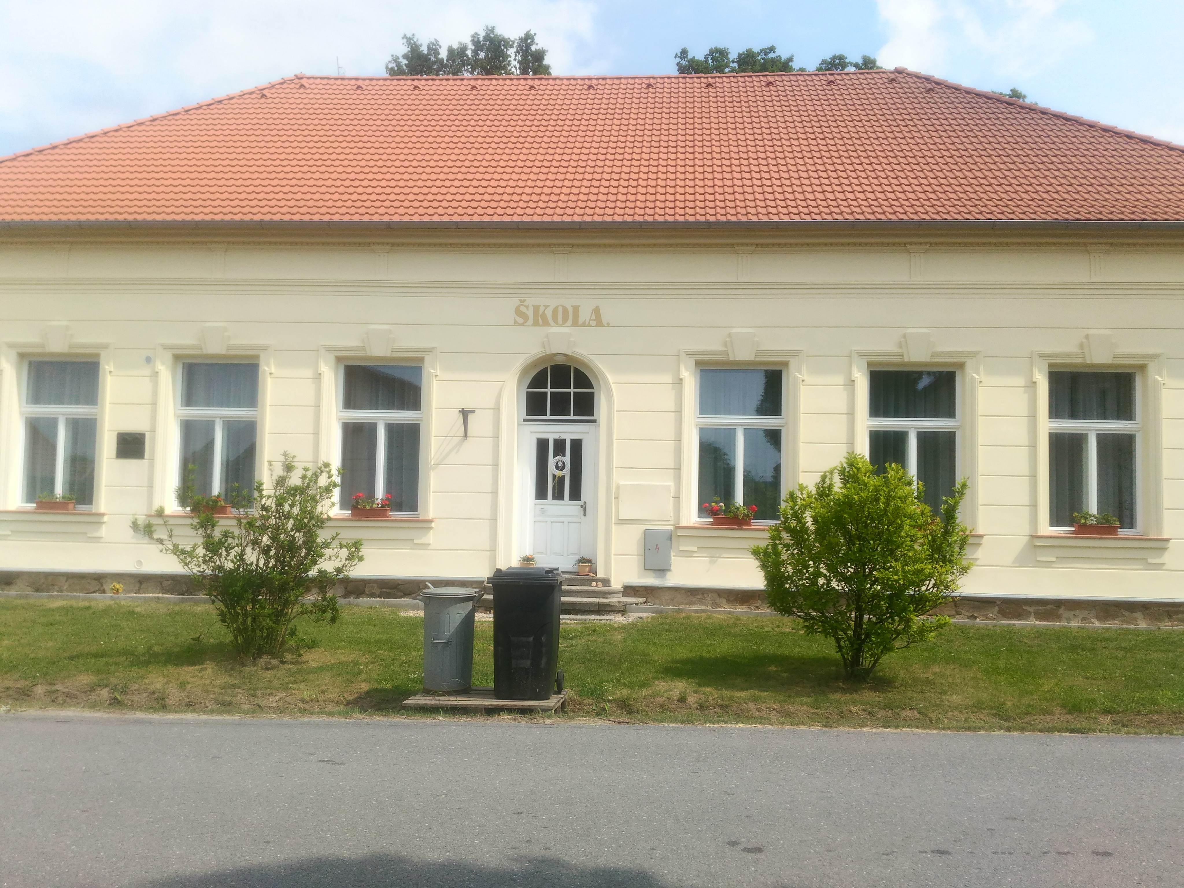 Řevnov, okres Tábor, Česká republika